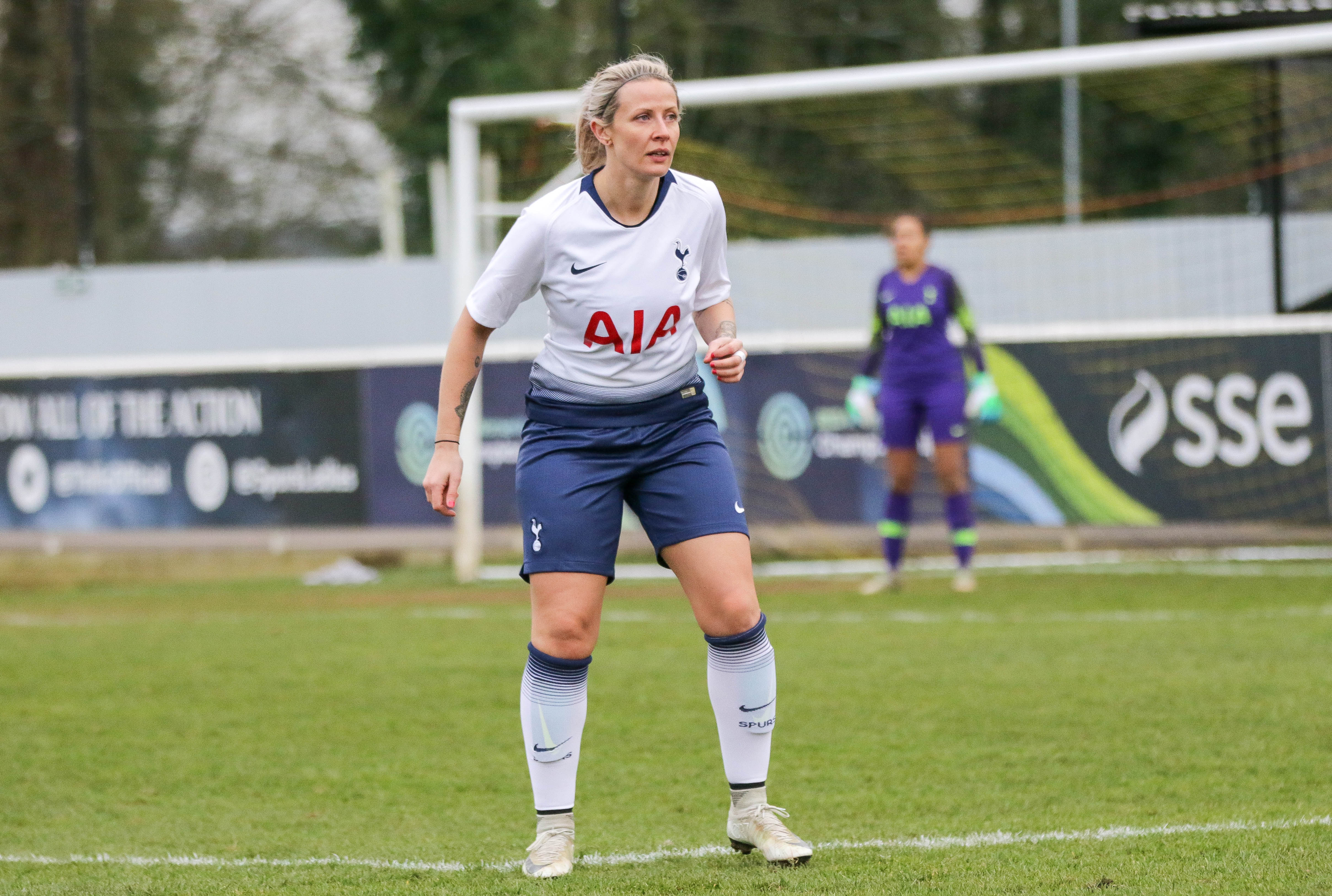 Emma Beckett